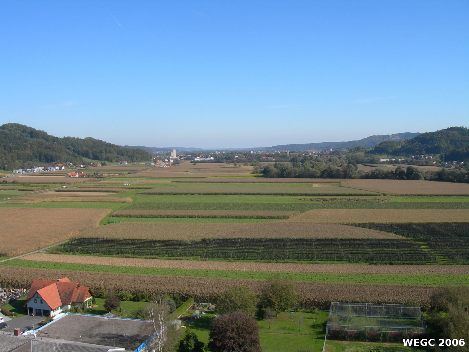 Raabtal 2006